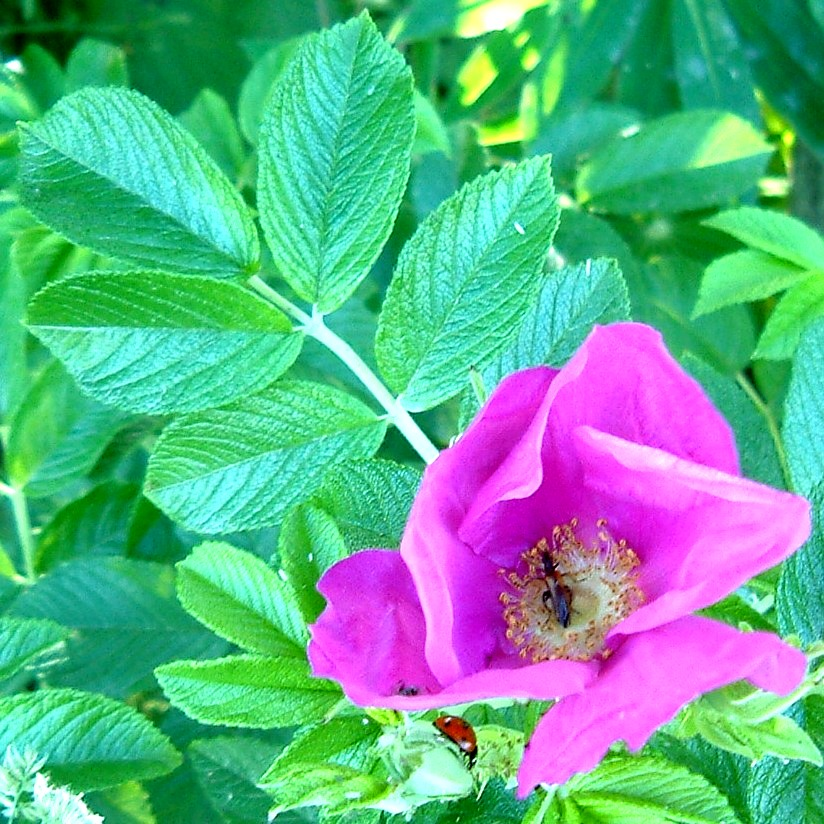 Rosa rugosa